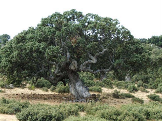 Quercus rotundifolia Encina Carrasca, Sierra de Ávila, España